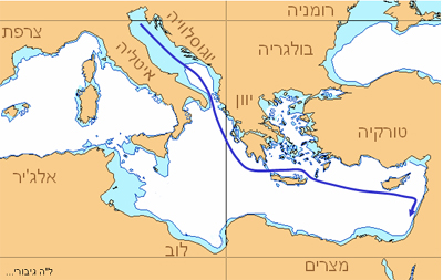 מסלול ההפלגה של אוניית המעפילים ל"ה גיבורי גוש עציון